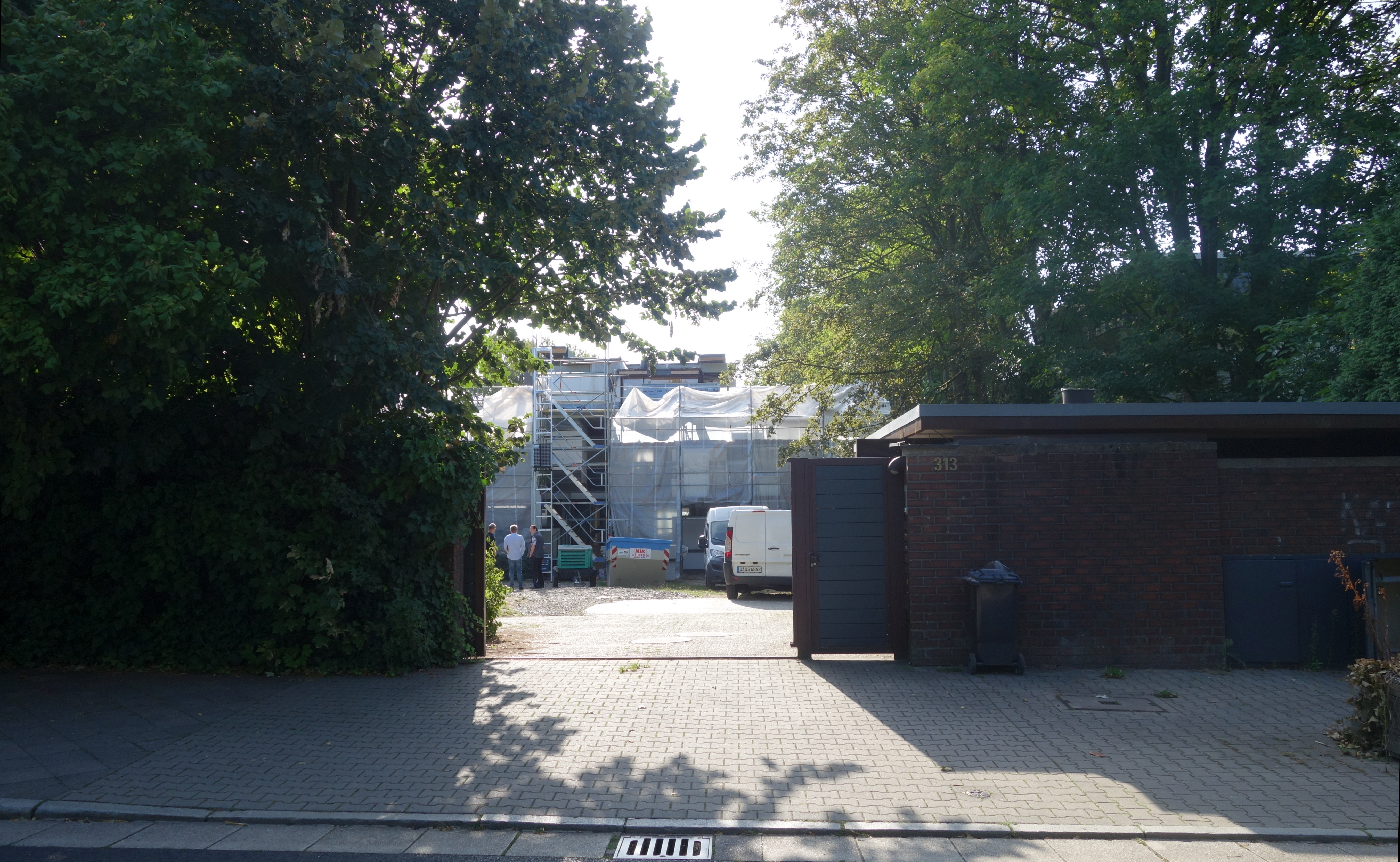 Atelierhaus Ludwig in Renovierung, Bergische Landstraße 313 (Düsseldorf-Hubbelrath), August 2019.